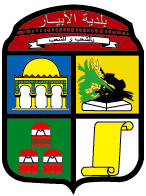 Logo de la commune d'El Biar (Alger), j'ai créé ce logo libre pour qu'il pourra devenir semblable au maximum possible au logo officiel de la mairie